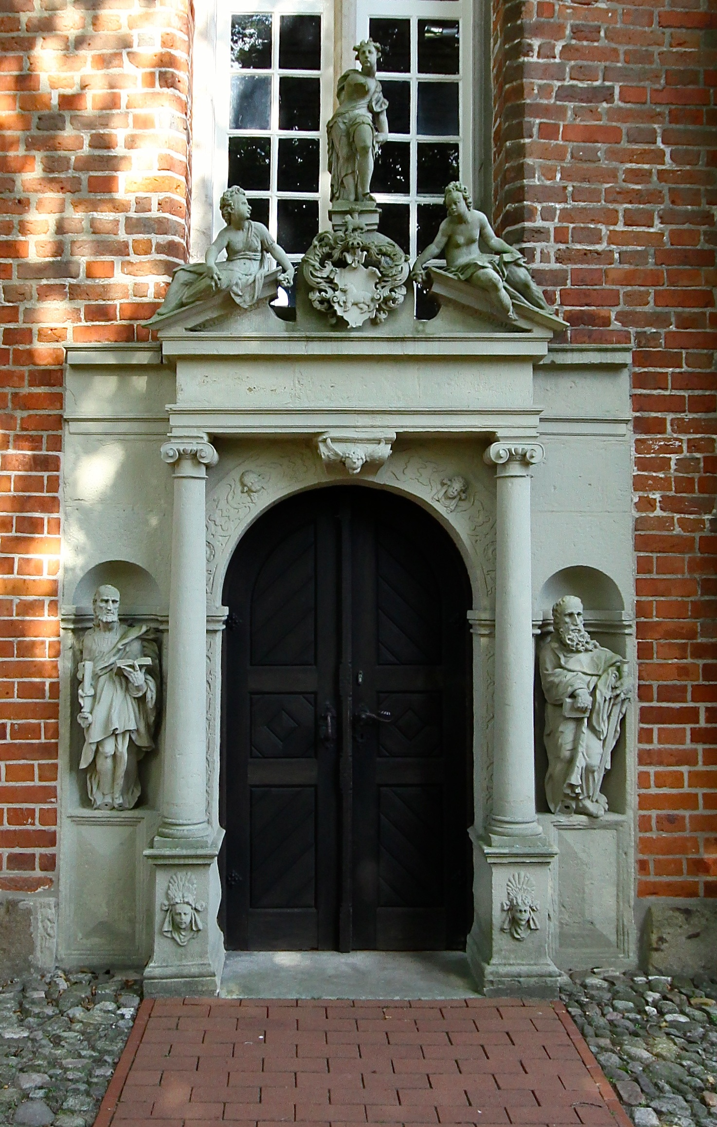 Portal der St.-Georg-Christophorus-Jodokus-Kirche in Stellichte